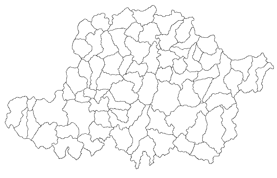 Categorie:Hărţi ale judeţului Arad